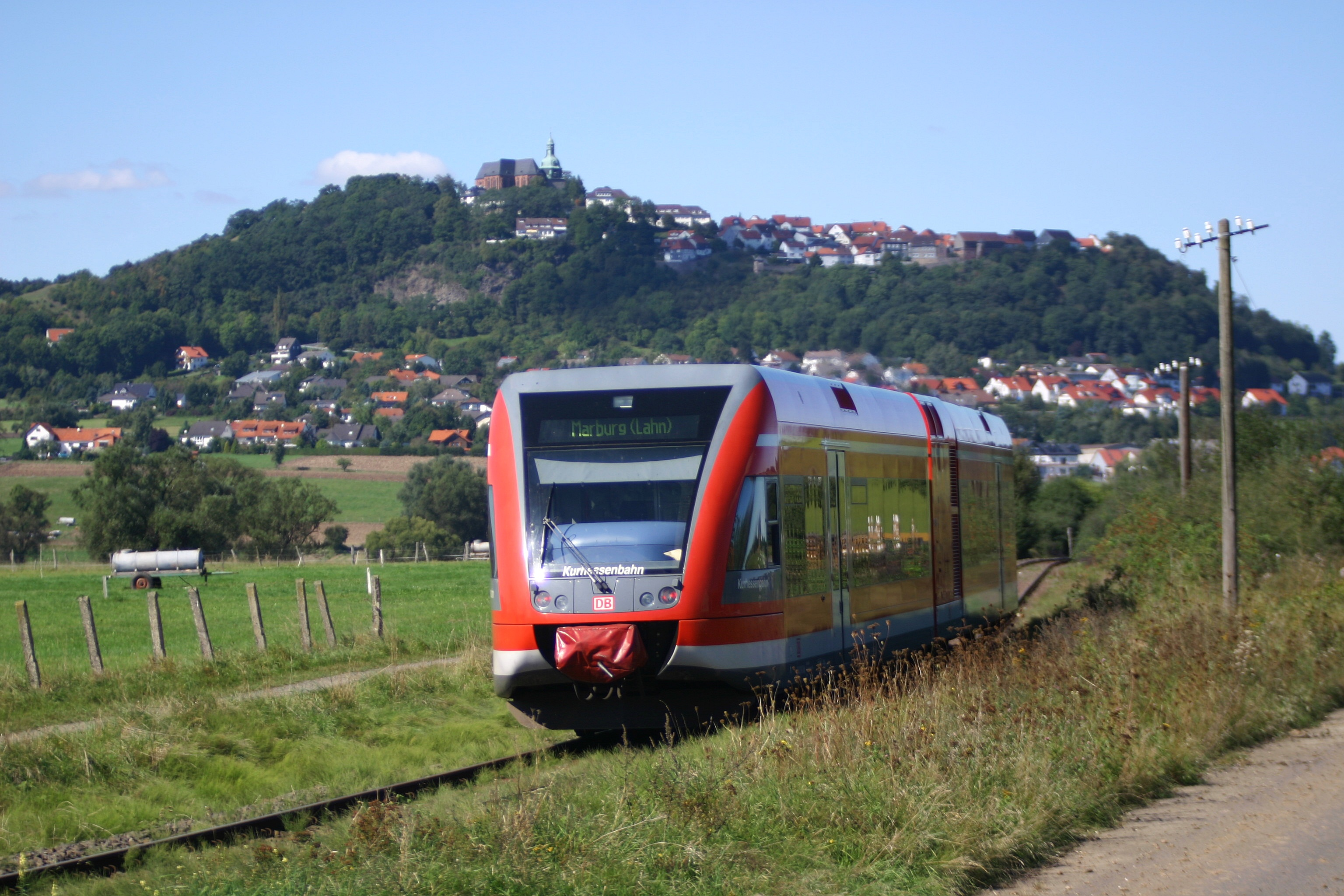 Sonderzug auf der Ohmtalbahn zwischen den Stationen Rüdigheim und Amöneburg (im Hintergrund) am 18. September 2005.